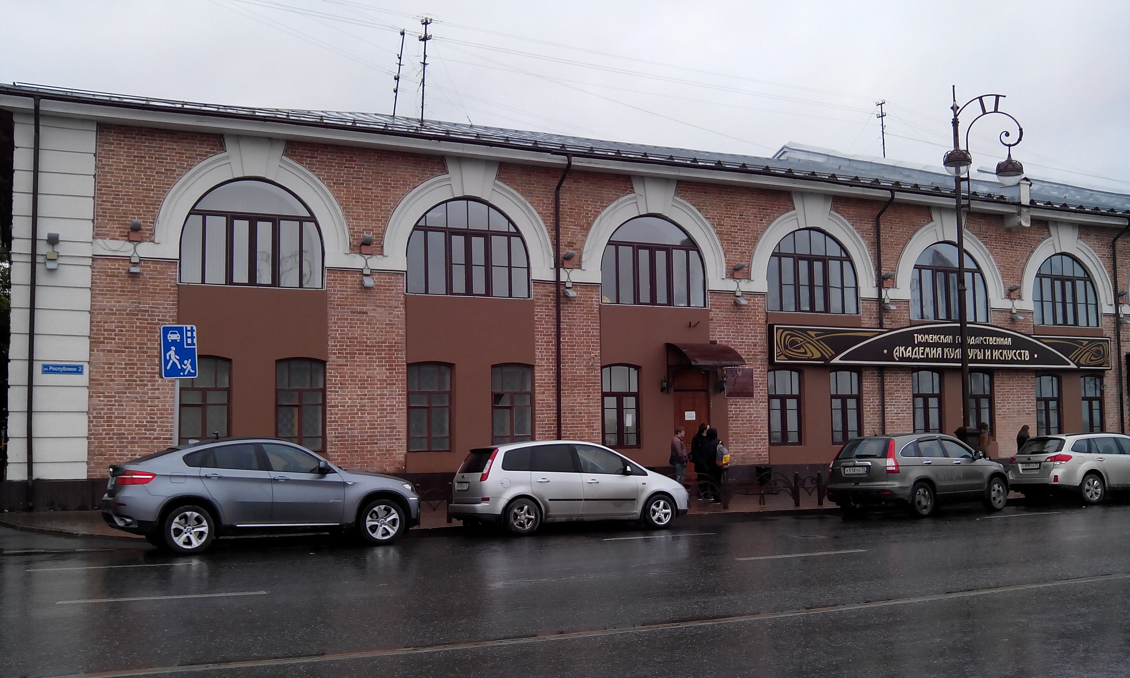 Дом жилой (Тюменская область, Тюмень, улица Республики, 2)